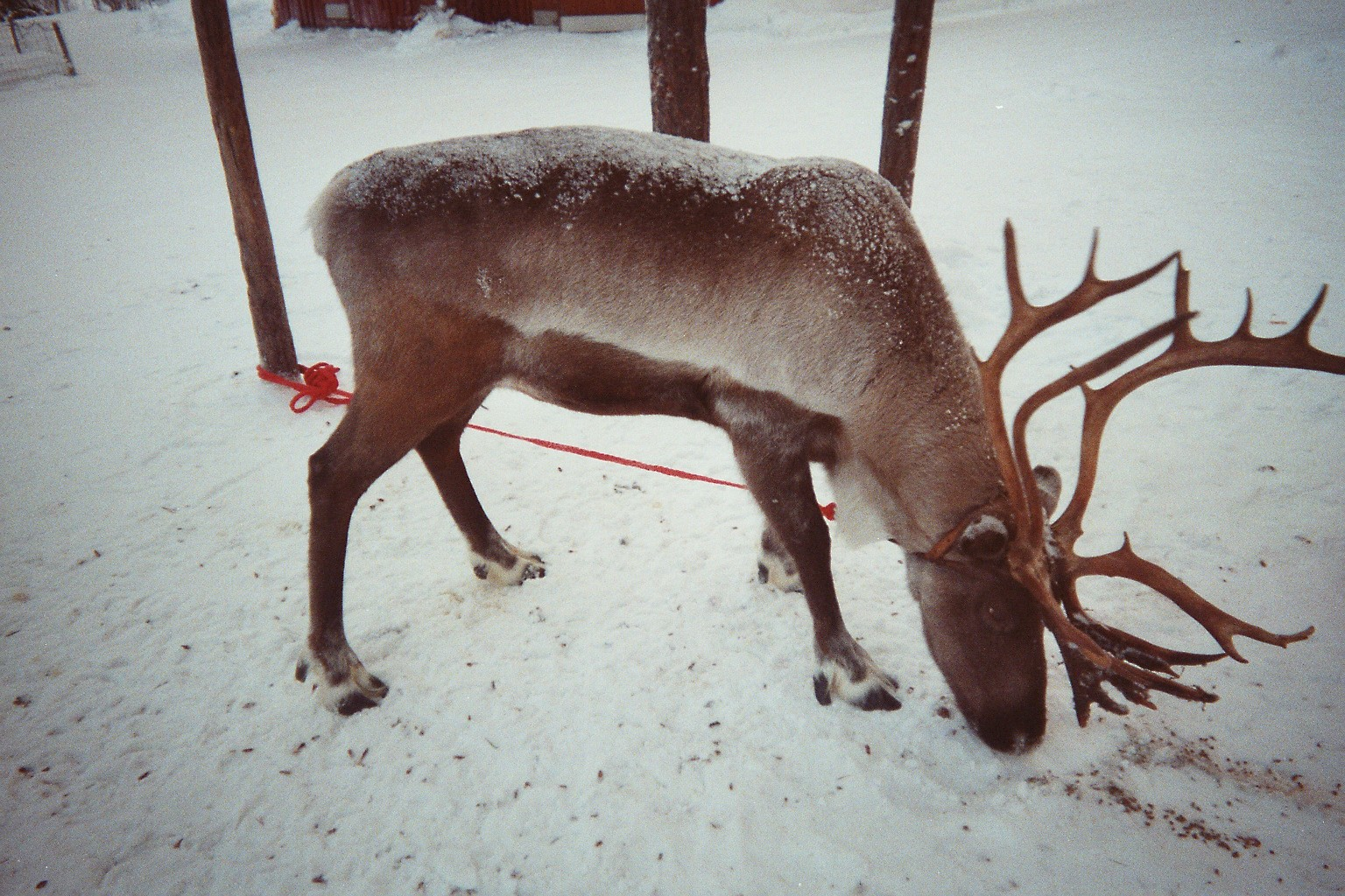 rennes en Laponie finlandaise, près du lac Inari